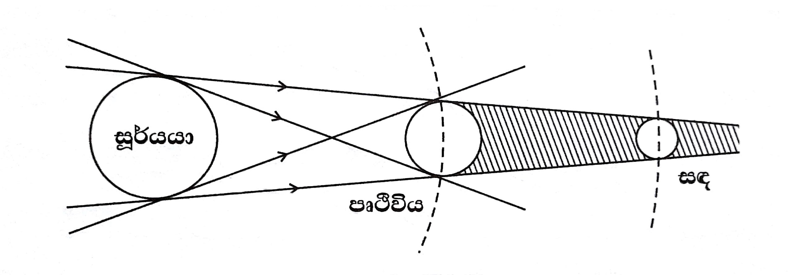 සිංහල: චන්ද්‍ර ග්‍රහණය